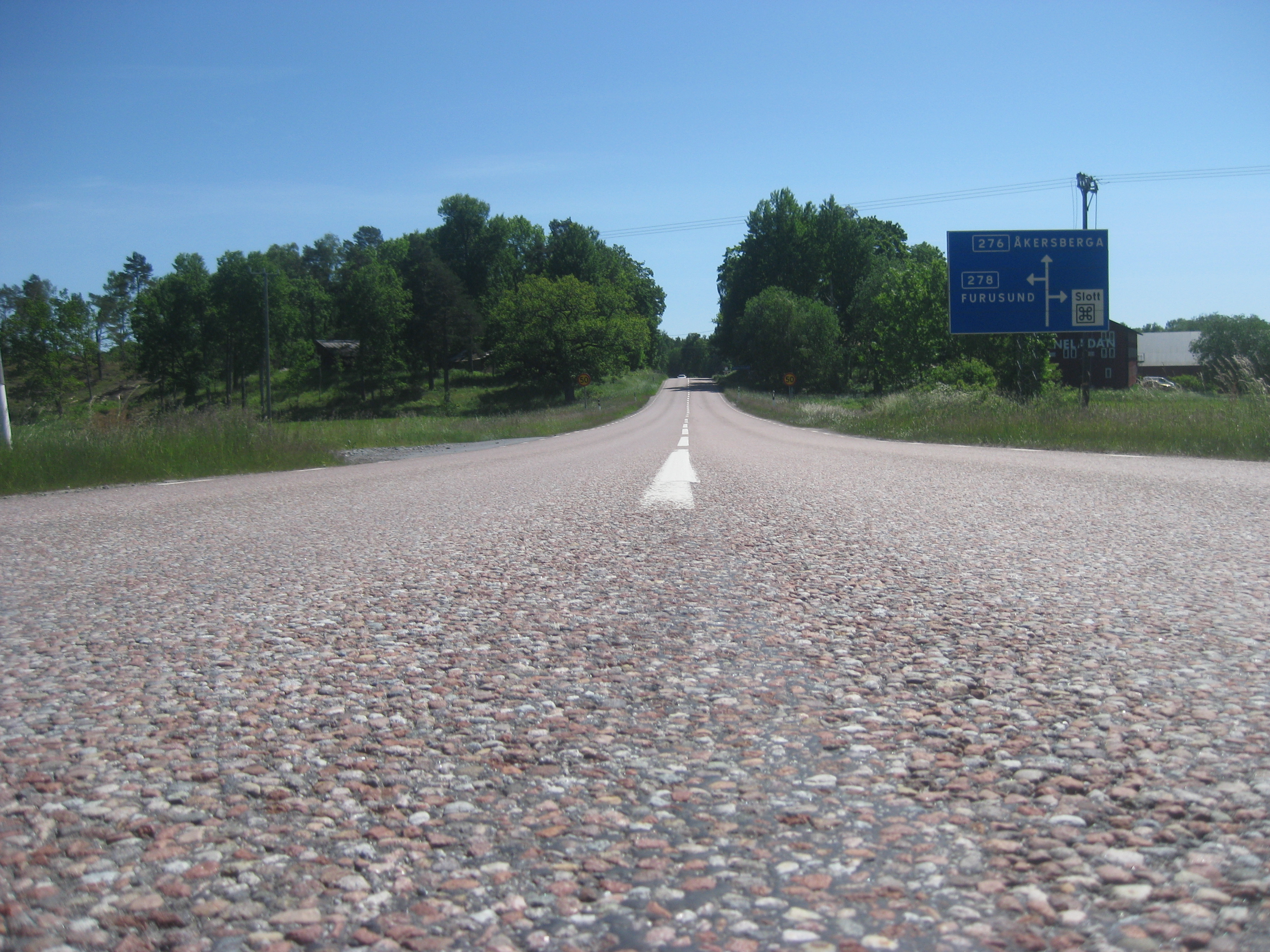 Road 276, in Sweden.